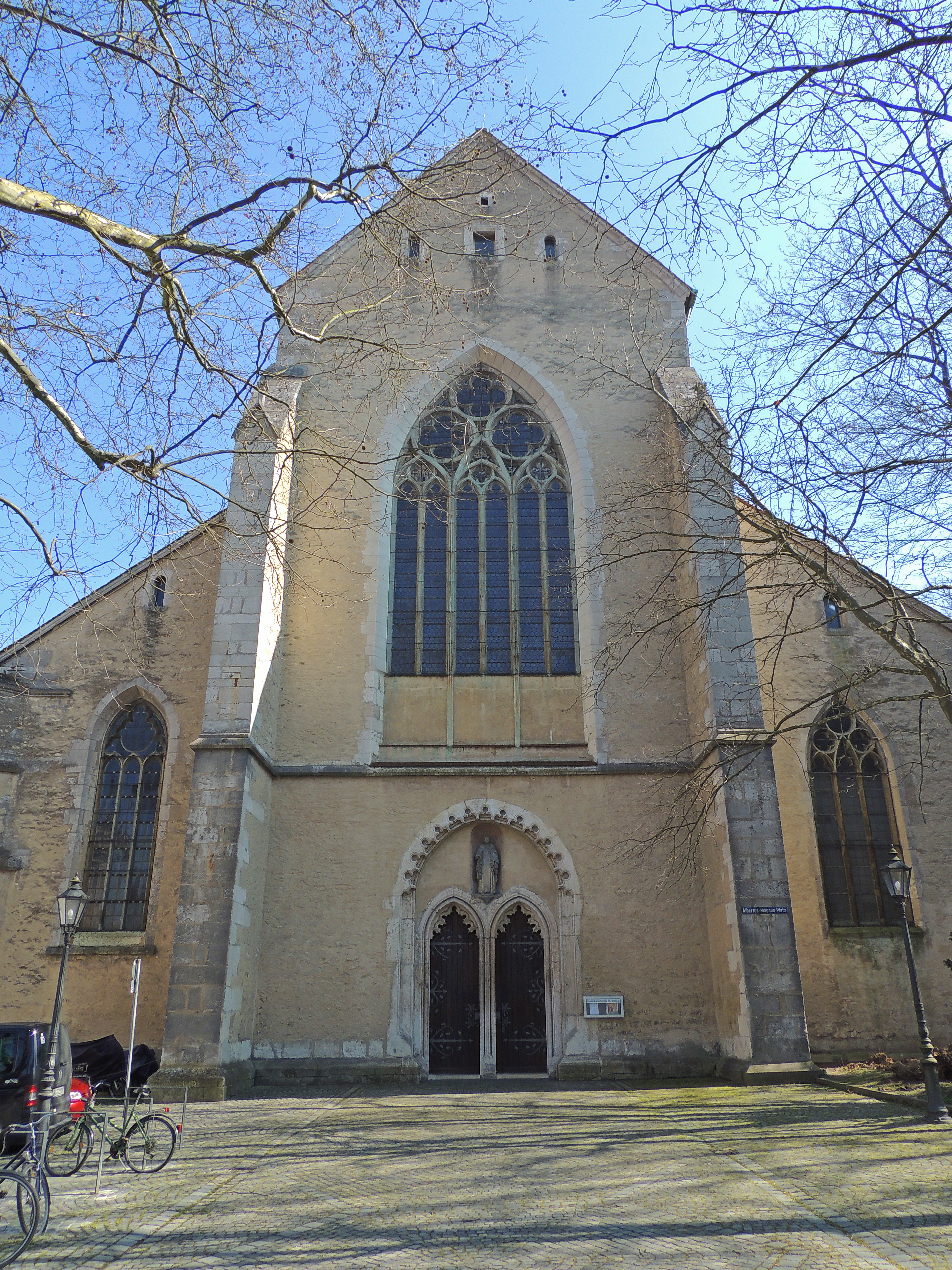 Die ehemalige Dominikanerkirche St. Blasius wurde von ca. 1246 bis 1384 erbaut (Chorbau vor 1246-79, Langhaus um 1280-1384). Sie ist die größte Kirche der Bettelorden in Süddeutschland. D-3-62-000-24This is a photograph of an architectural monument.